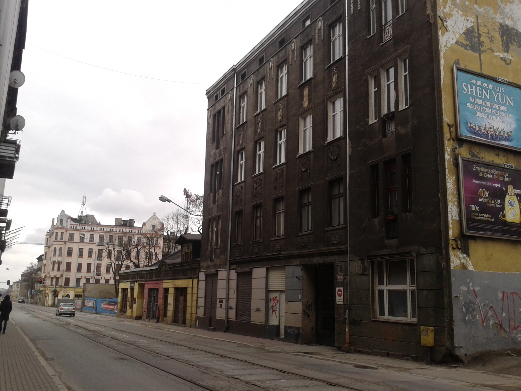 Łódż, ul. J. Kilińskiego 105 (w IV 2015); miejsce zamieszkania i biuro Mordechaja Chaima Rumkowskiego, Przełożonego Starszeństwa Żydów w Łodzi (1939-1944), od 192... do kon. 1939 (porównaj jego ogłoszenie w "Ilustrowanej Republice} z 1929 .